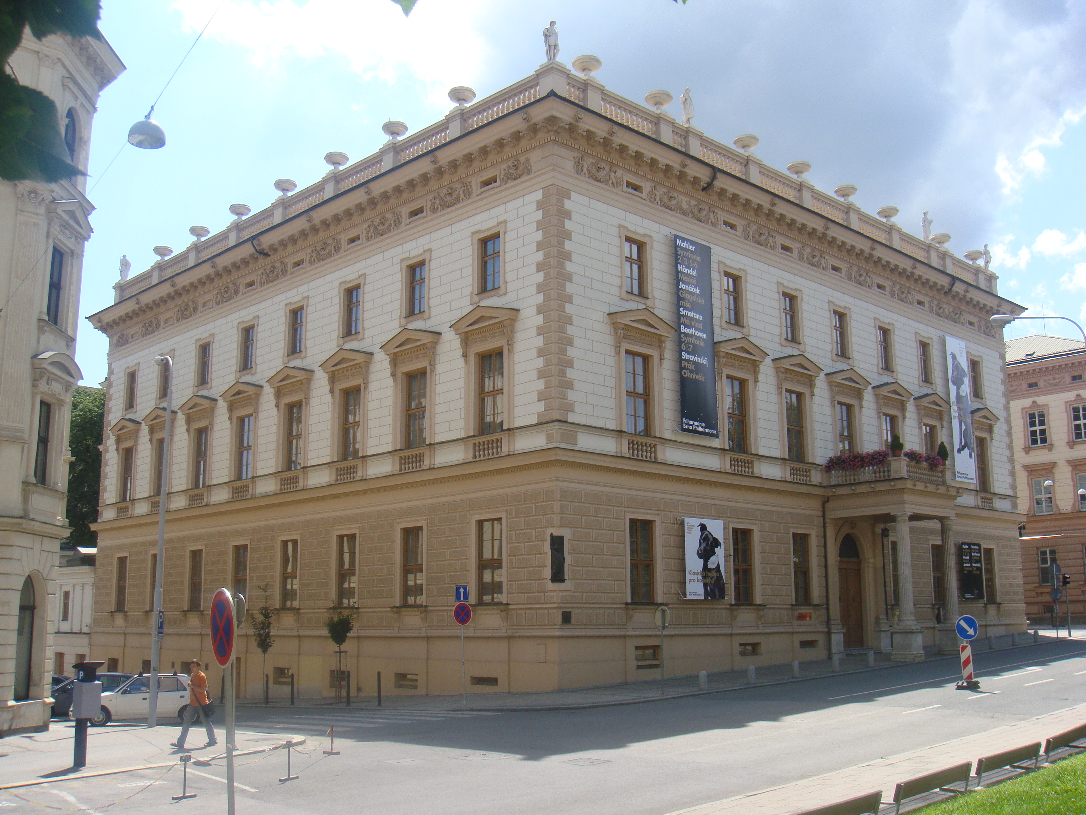 Vereinshaus in Brünn